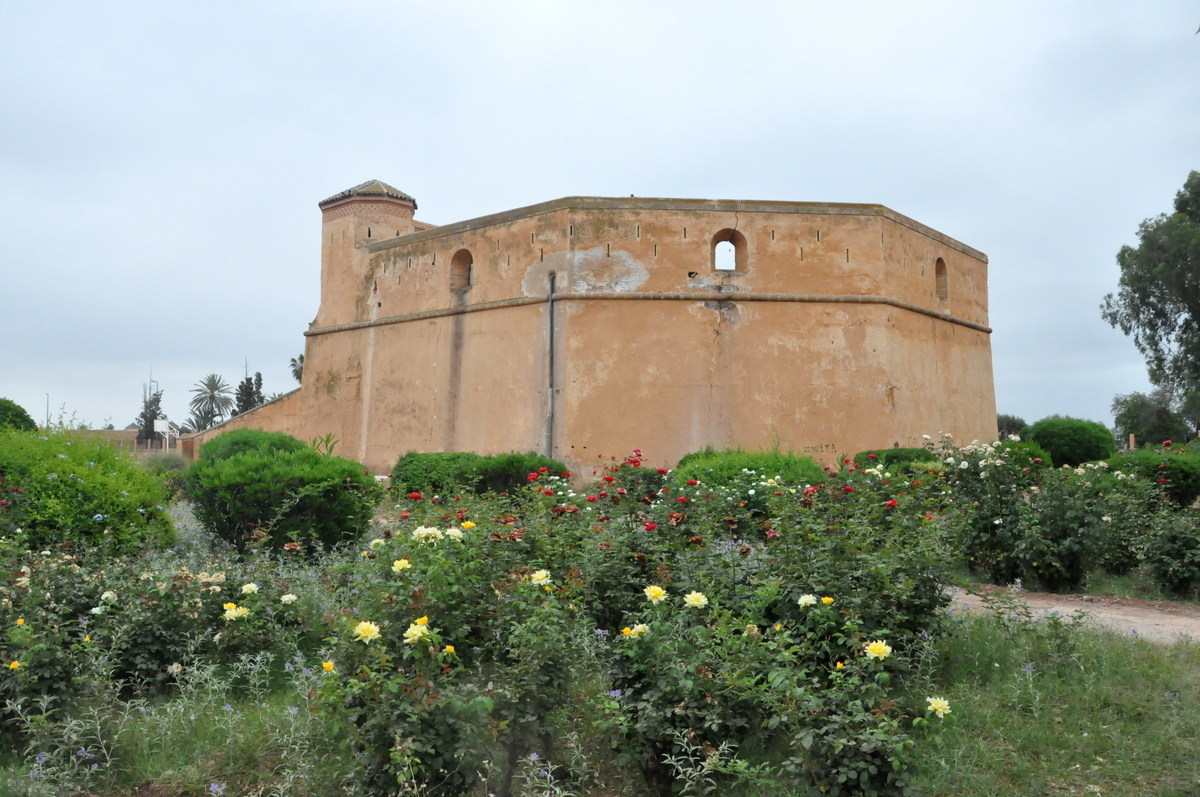 Sidi Aâmara, defensa sur de la ciudad de Marrakech en calle d’Ourika